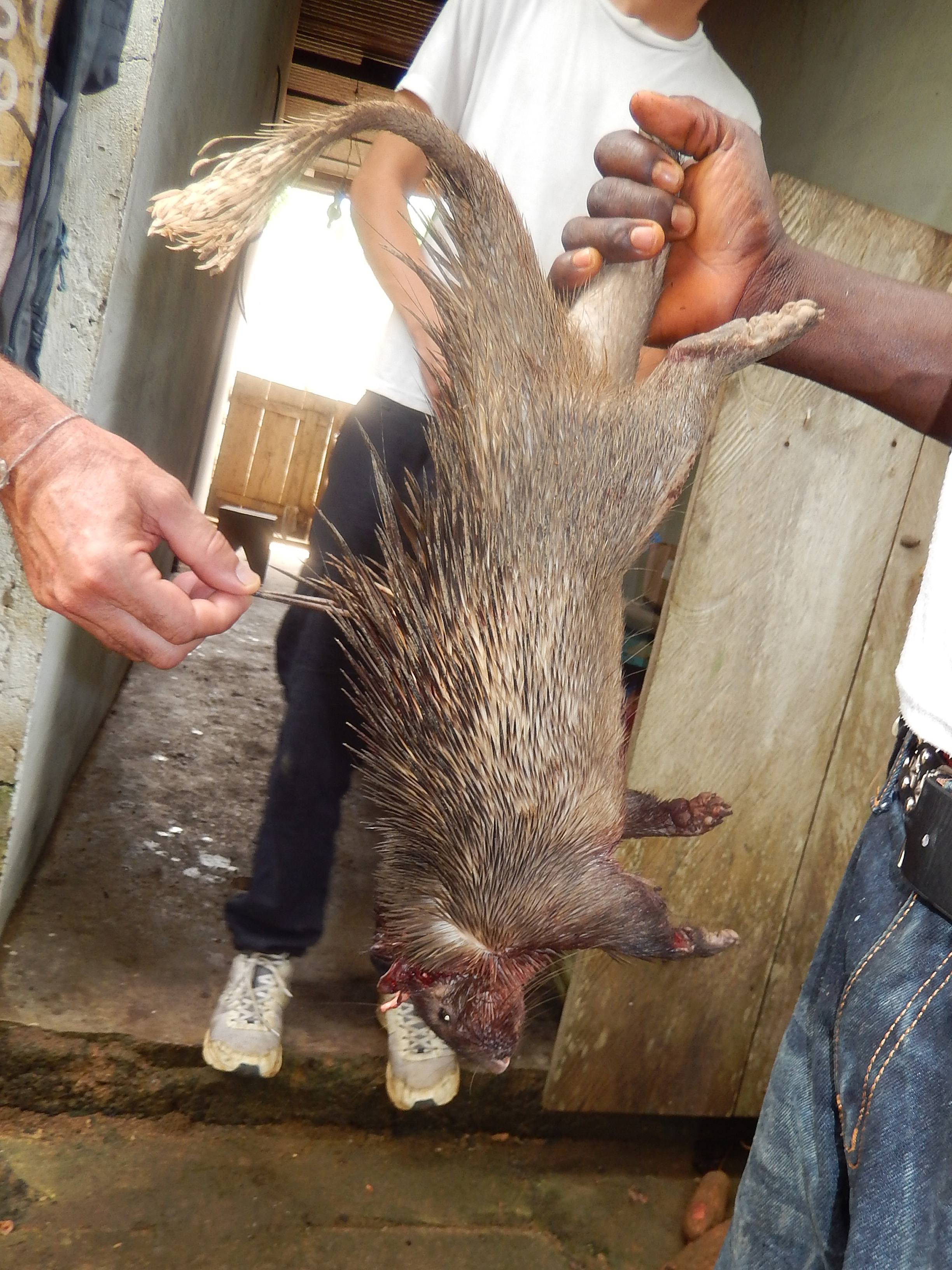 Porc-épic au Cameroun (Ngog-Mapubi, région du Centre)